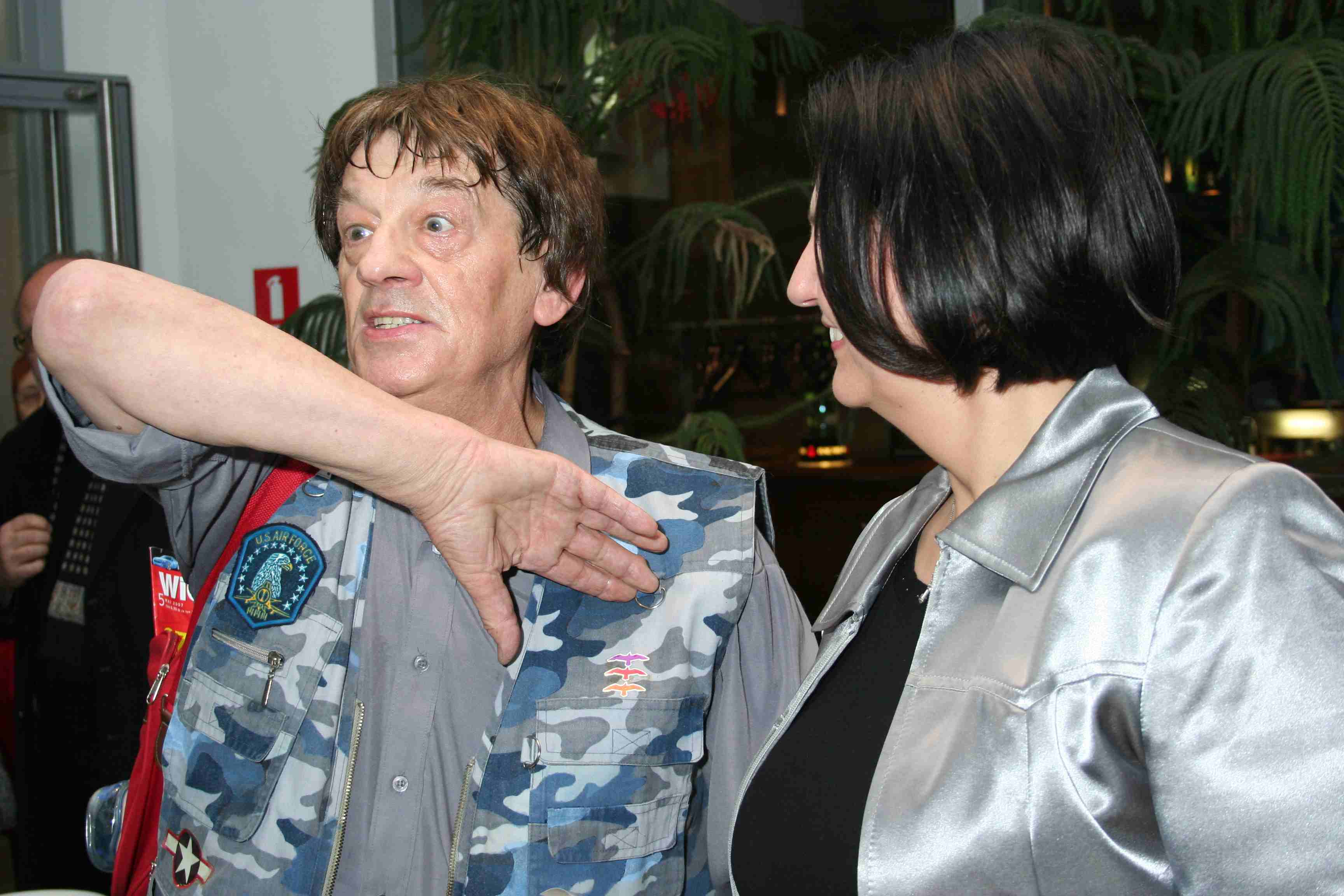 Zdzisław Jurkiewicz i Elżbieta Jolanta Kościelak na wernisażu wystawy Zdzisława Jurkiewicza "Żegluga ducha, albo trzy miłości" w Galerii Kościelak, Hotel Sofitel we Wrocławiu, 2007. Fot. Stanisław Sielicki. Z archiwum E. Kościelak.